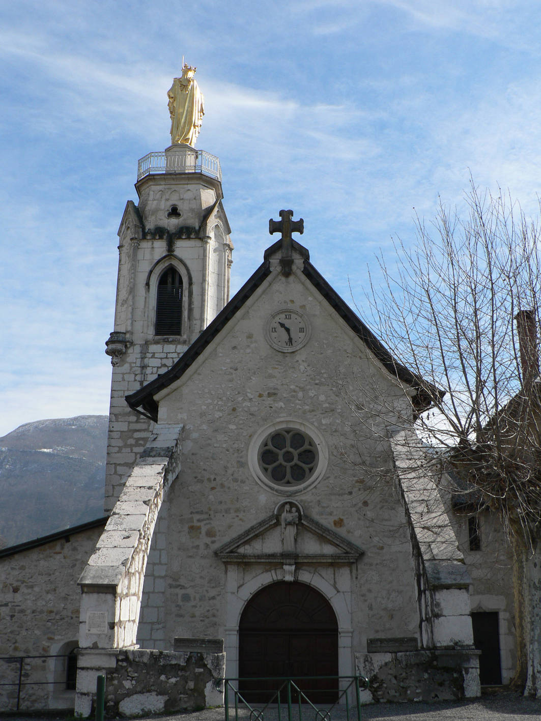 Le Sanctuaire de la Vierge Noire 1452 (Myans (Savoie))